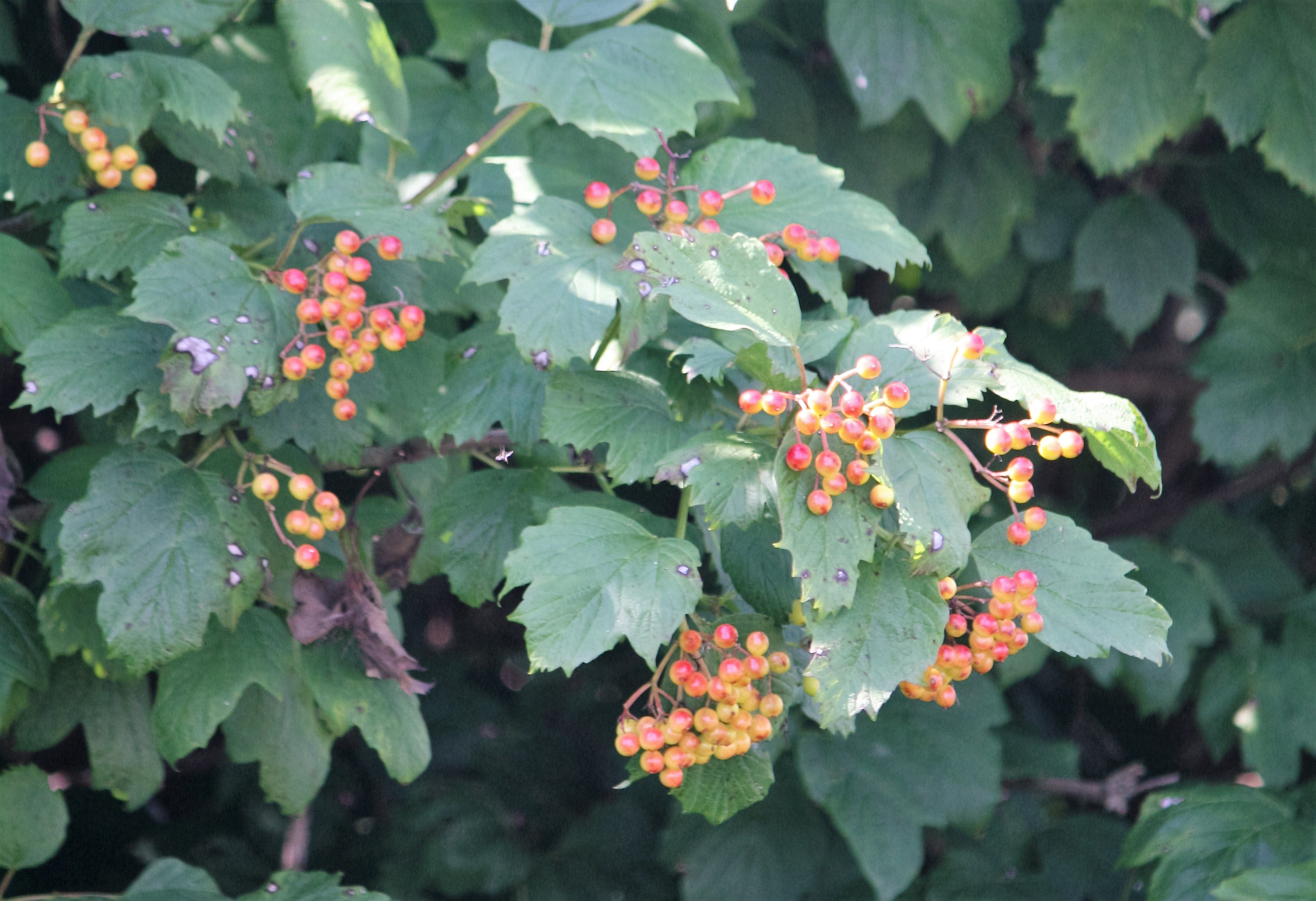 Beeren im Schwabener Moos